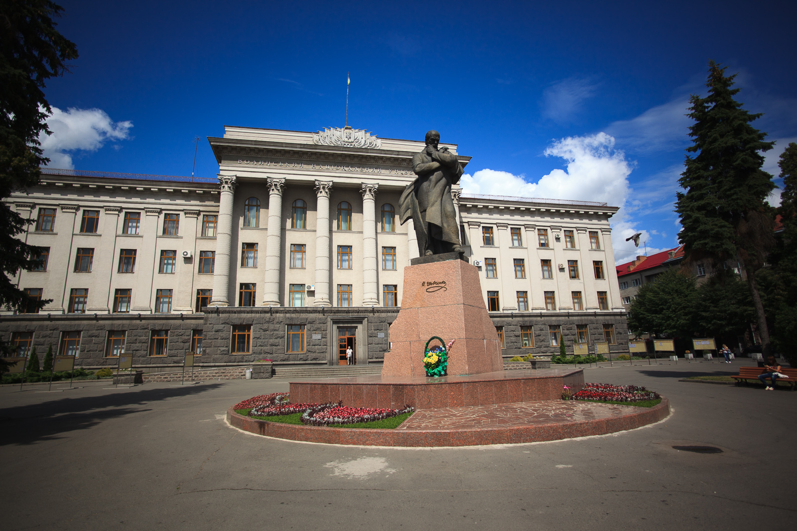 Будівля обкому партії та облвиконкому (мур.) 1958 р.